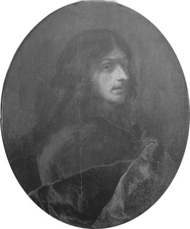 Self-portrait